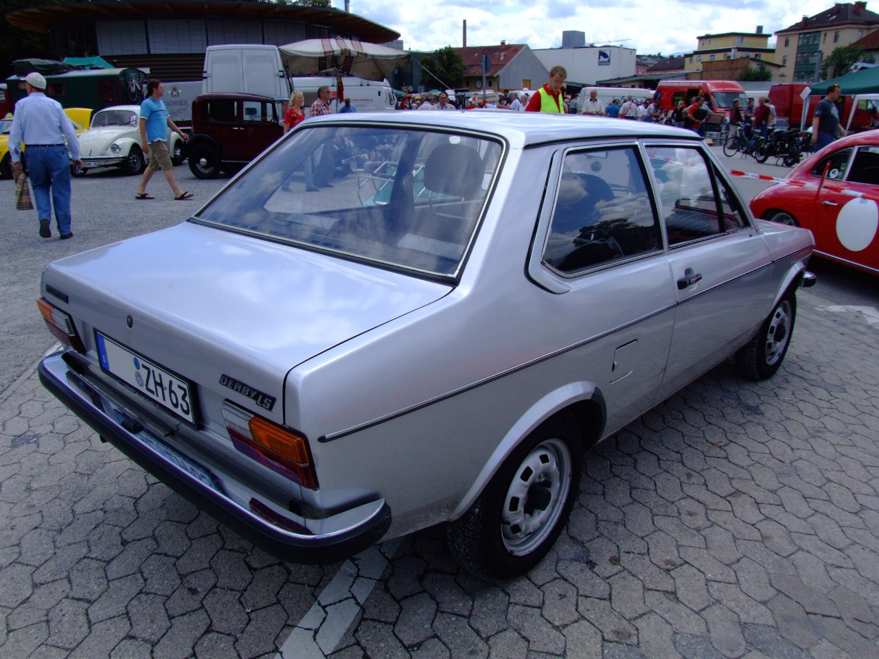 VW Derby LS